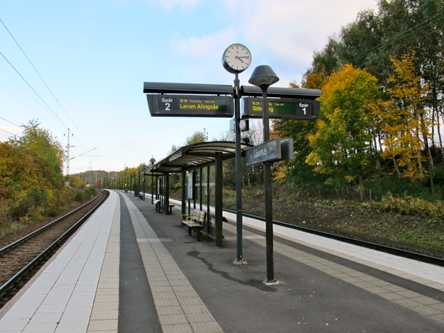 Savenäs pendeltågsstation i Göteborg oktober 2013